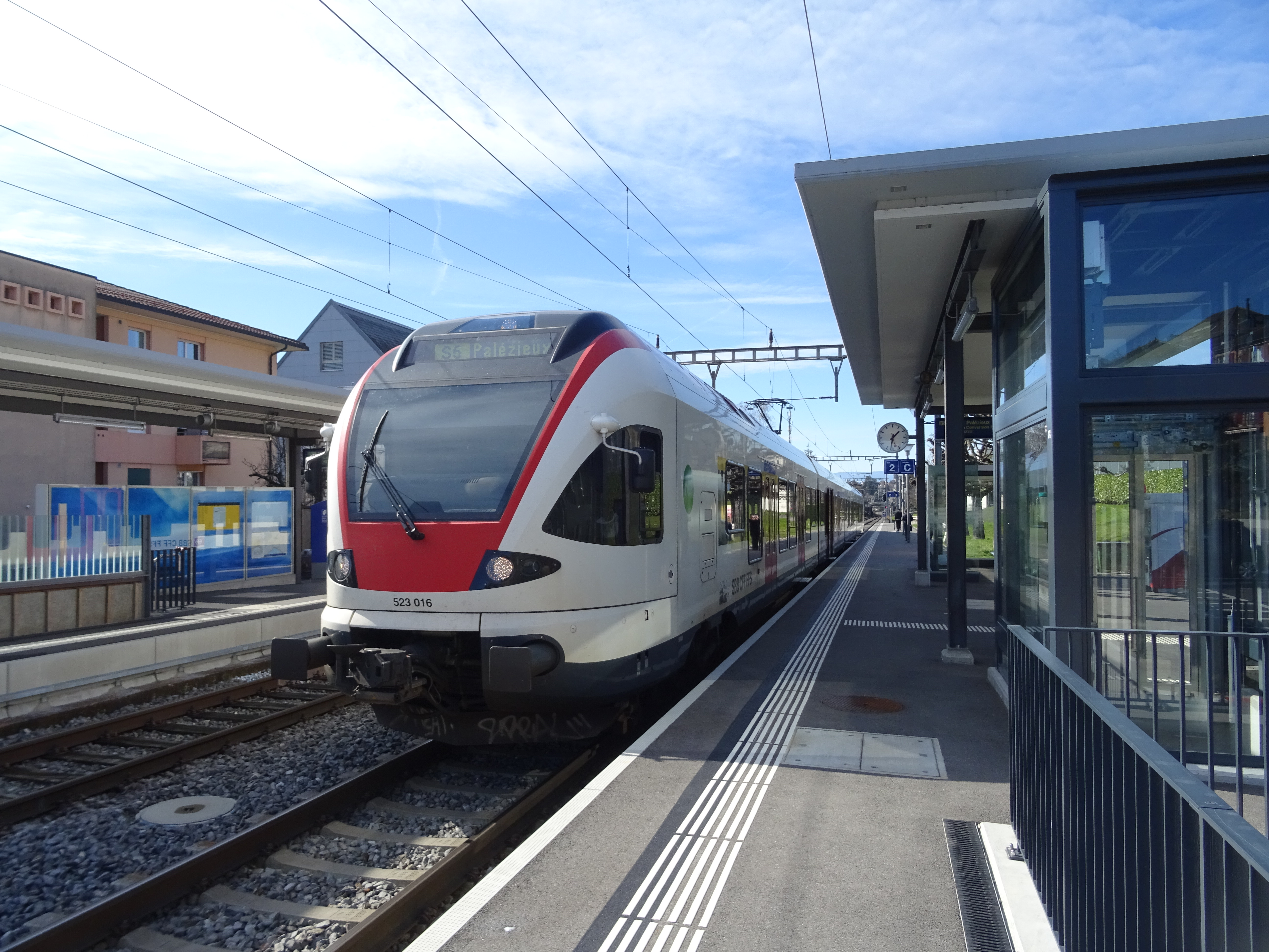 Stadler FLIRT RABe 523 à quai en gare de Pully-Nord et assurant un service de la ligne S5 en direction de Palézieux.